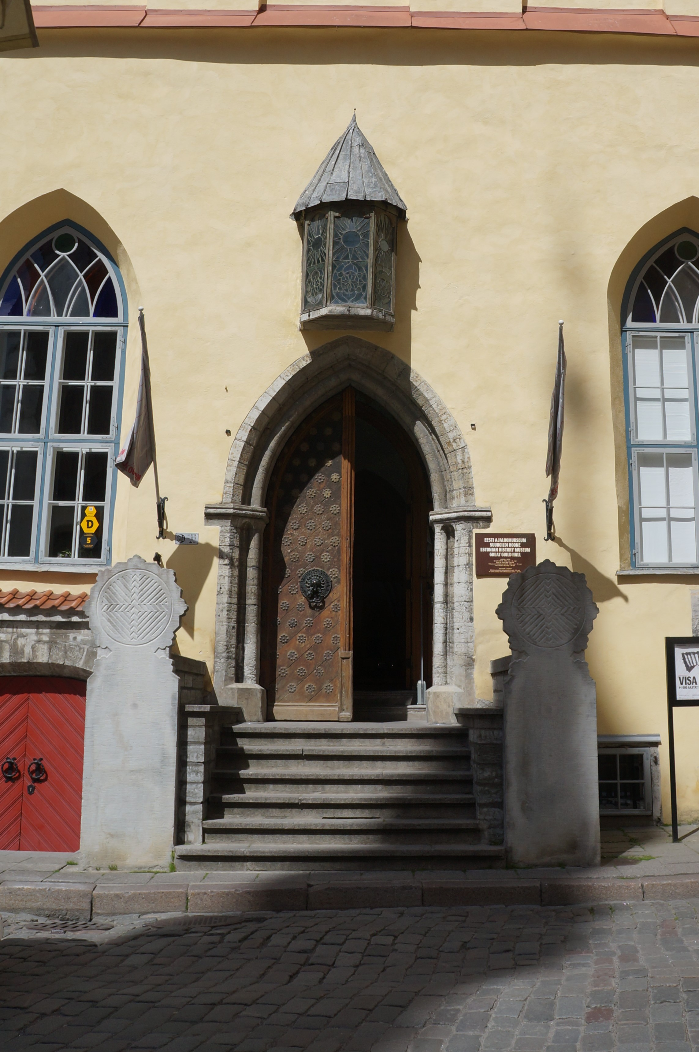 Grande Guilde. Musée d'Histoire Estonienne, Pikk 17, Tallinn, Estonie